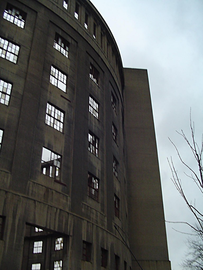 Gasometer Dresden, Germany, Gasanstaltstraße 10